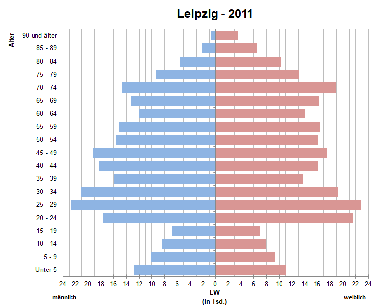 Bevölkerungspyramide der Stadt Leipzig nach Zensus 2011.